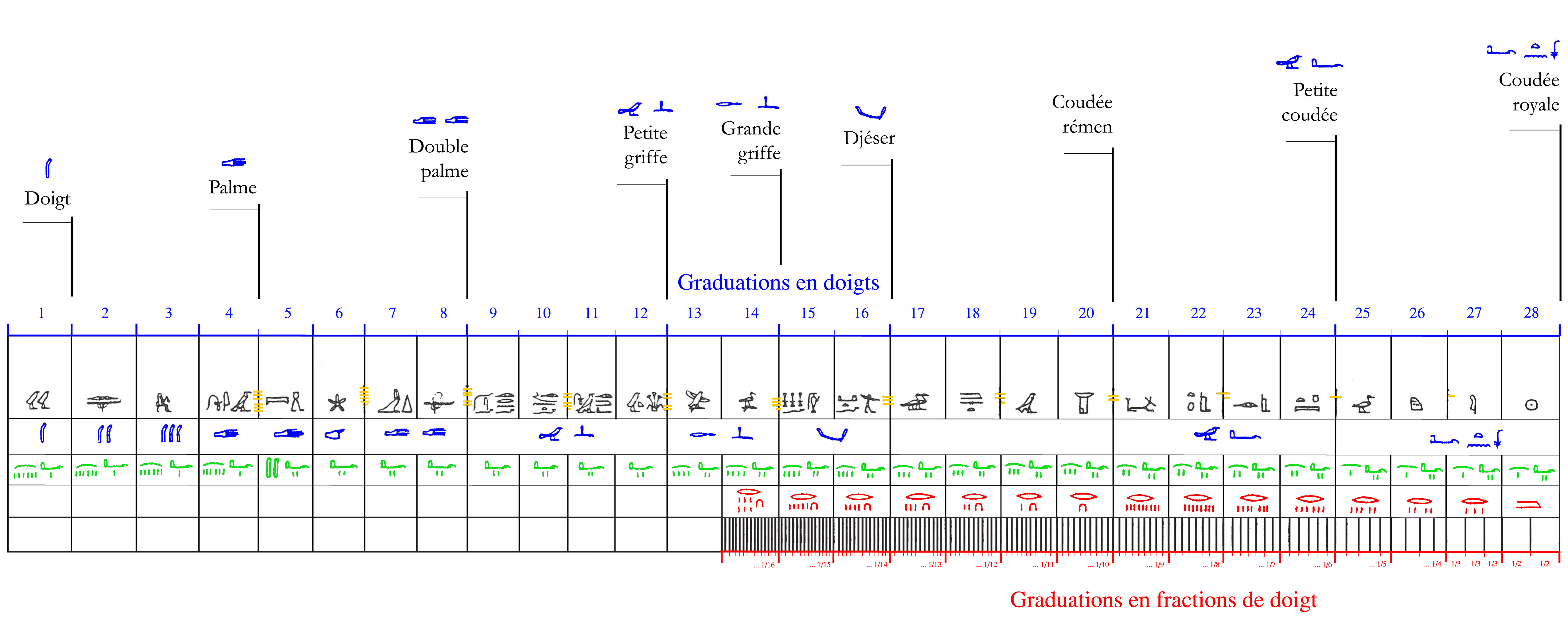 Représentation de la coudée royale égyptienne de Turin